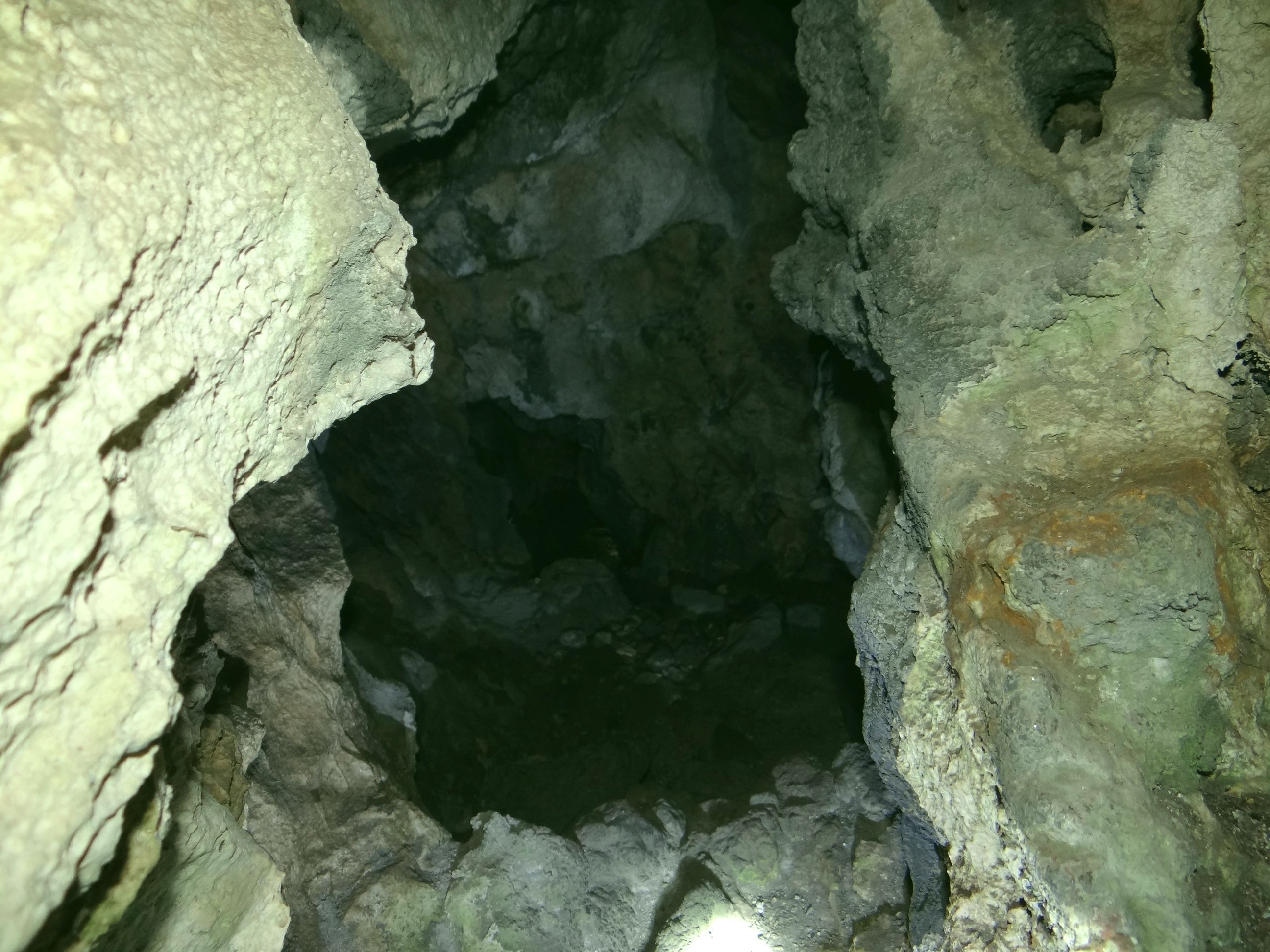 Dziurawiec na Tomaszówkach Dolnych